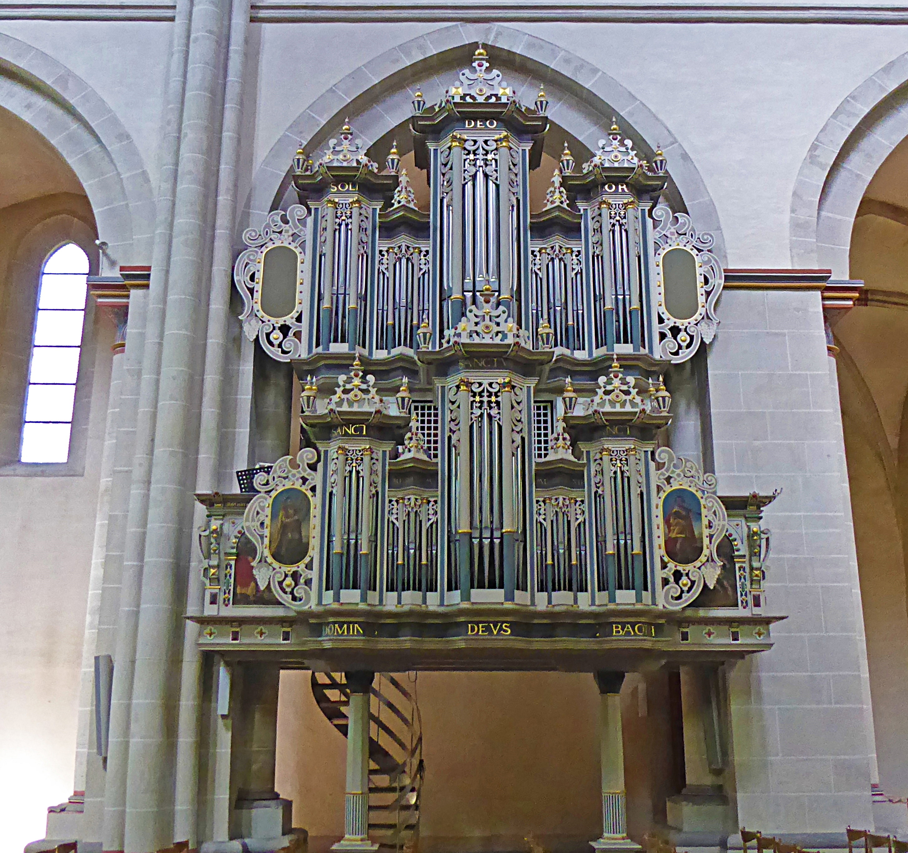 Orgel von Alfred Führer (Wilhelmshaven, 1979 III/P 31) im historischen Prospekt von Heinrich Compenius der Jüngere (vor 1619) in der Klosterkirche Riddagshausen (Braunschweig)